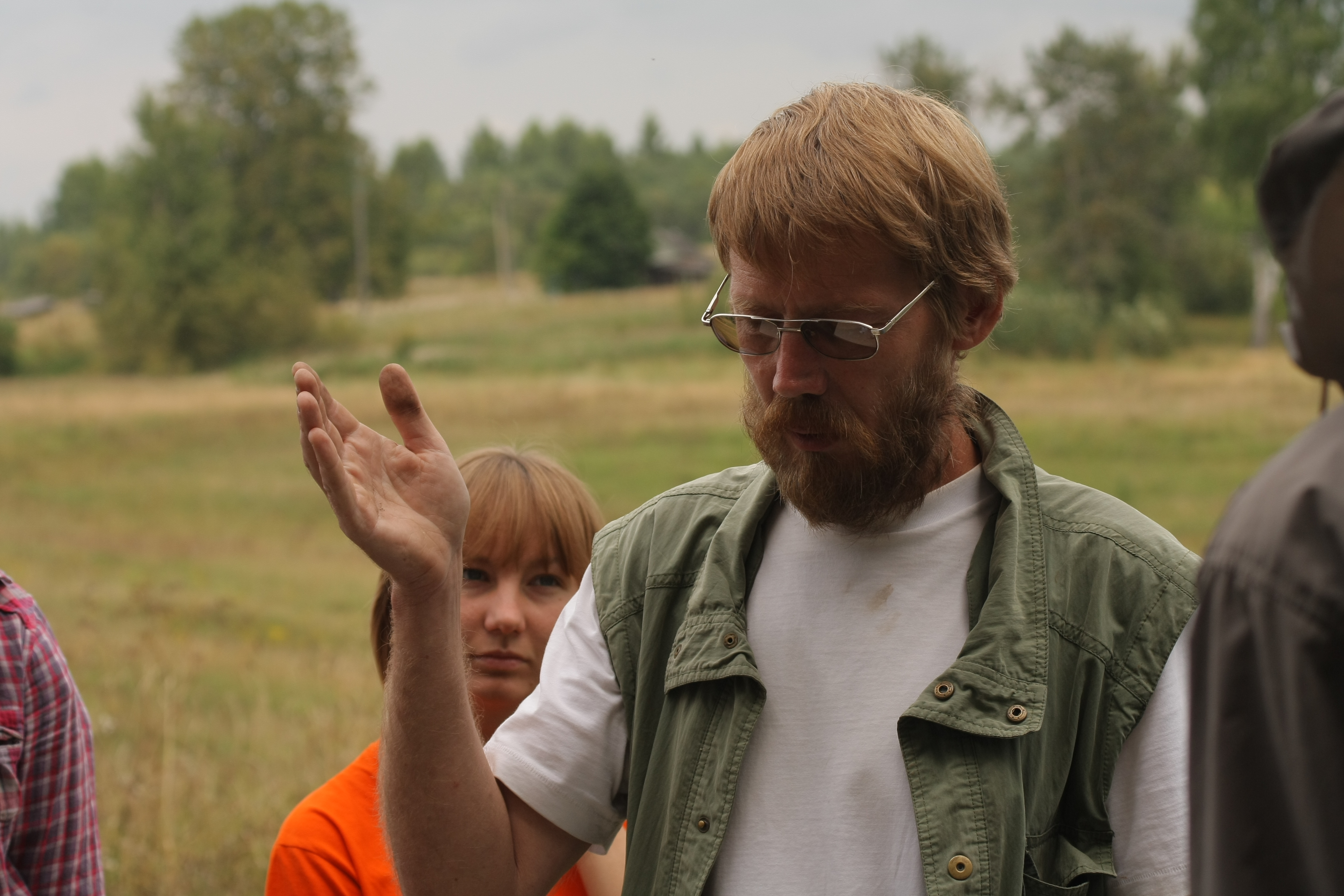 С.Д. Захаров разговаривает с практикантами на Крутике.